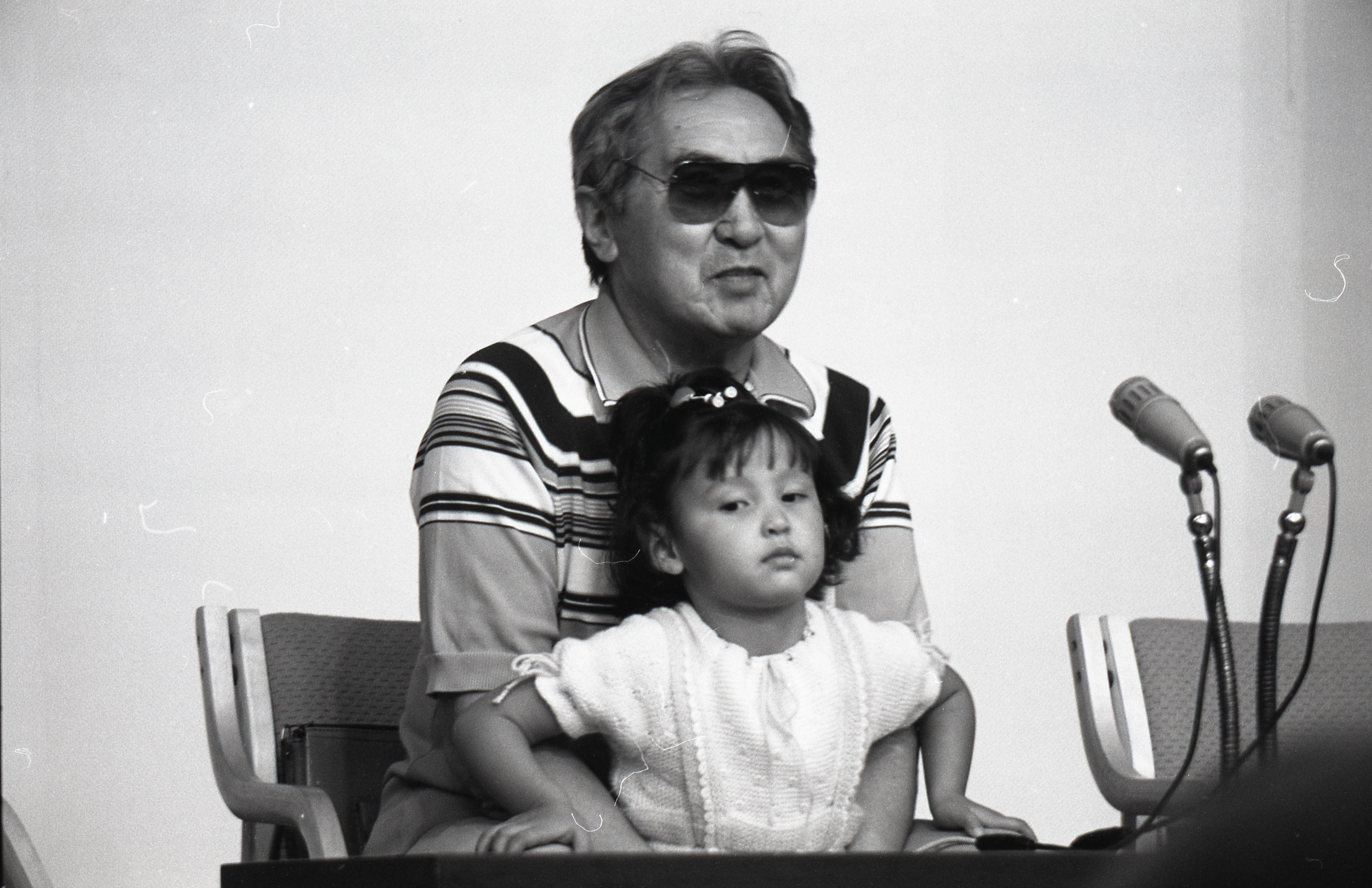 Tšõngõz Ajtmatov